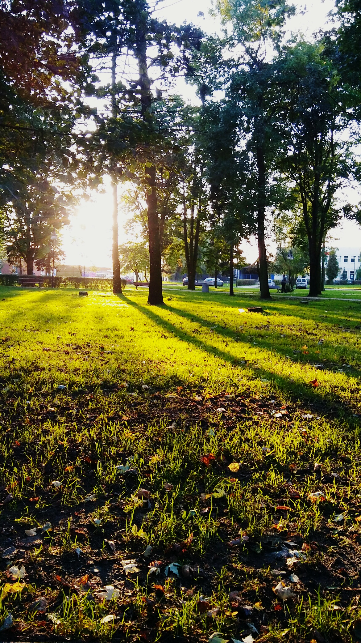 Park miejski w Koluszkach z widokiem na budynek pocztowy i przejście podziemne